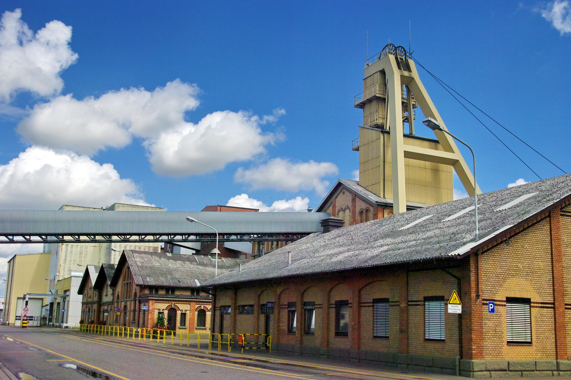 Förderturm Salzbergwerk Bad Friedrichshall